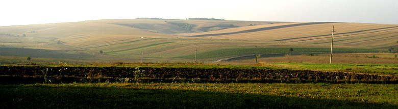 Oberflächenform direkt über der Optymistytschna Petschera beim Dorf Korolivka